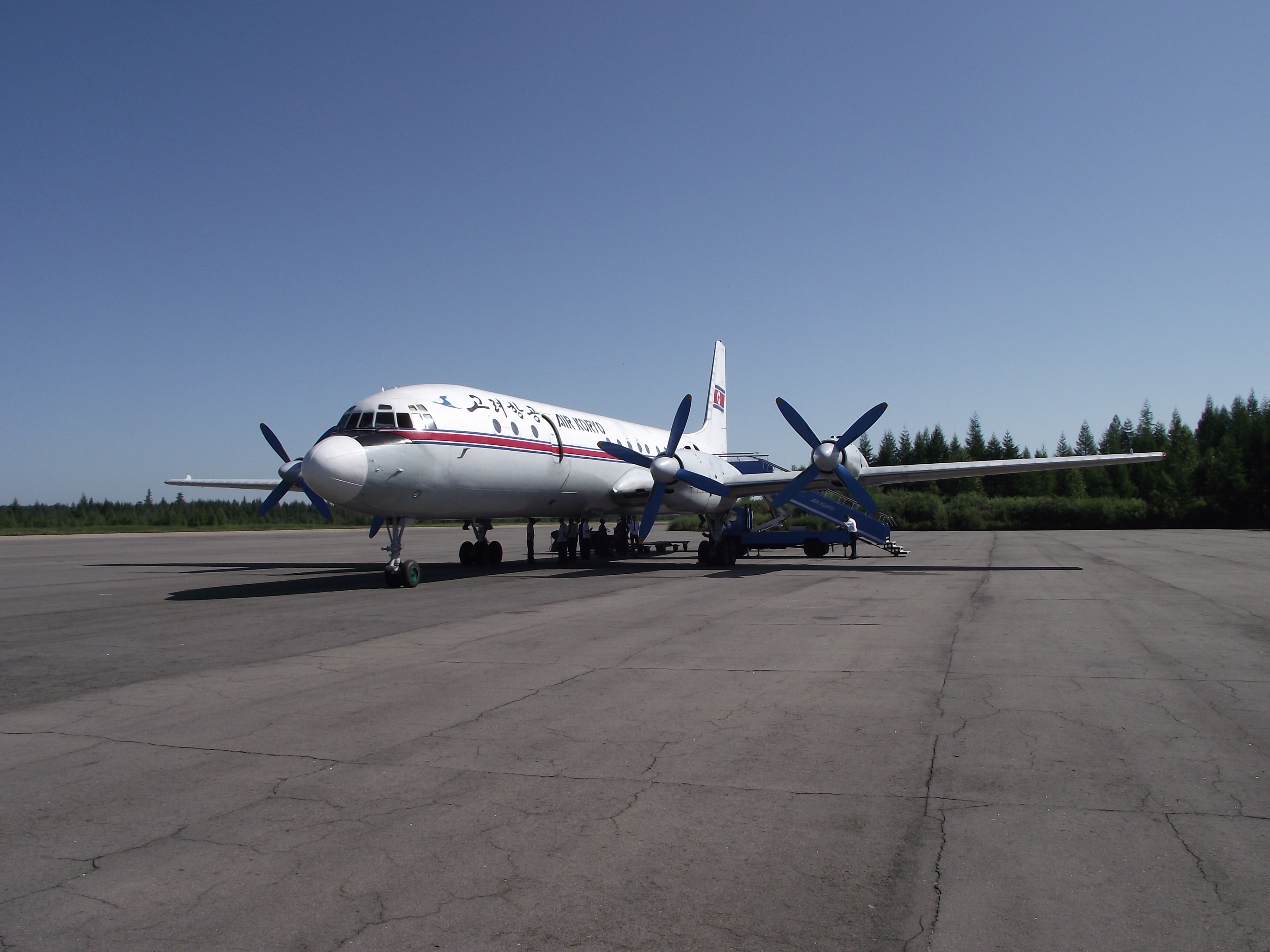 IL-18 Pyongyang to Samjiyon at Samjiyon airport